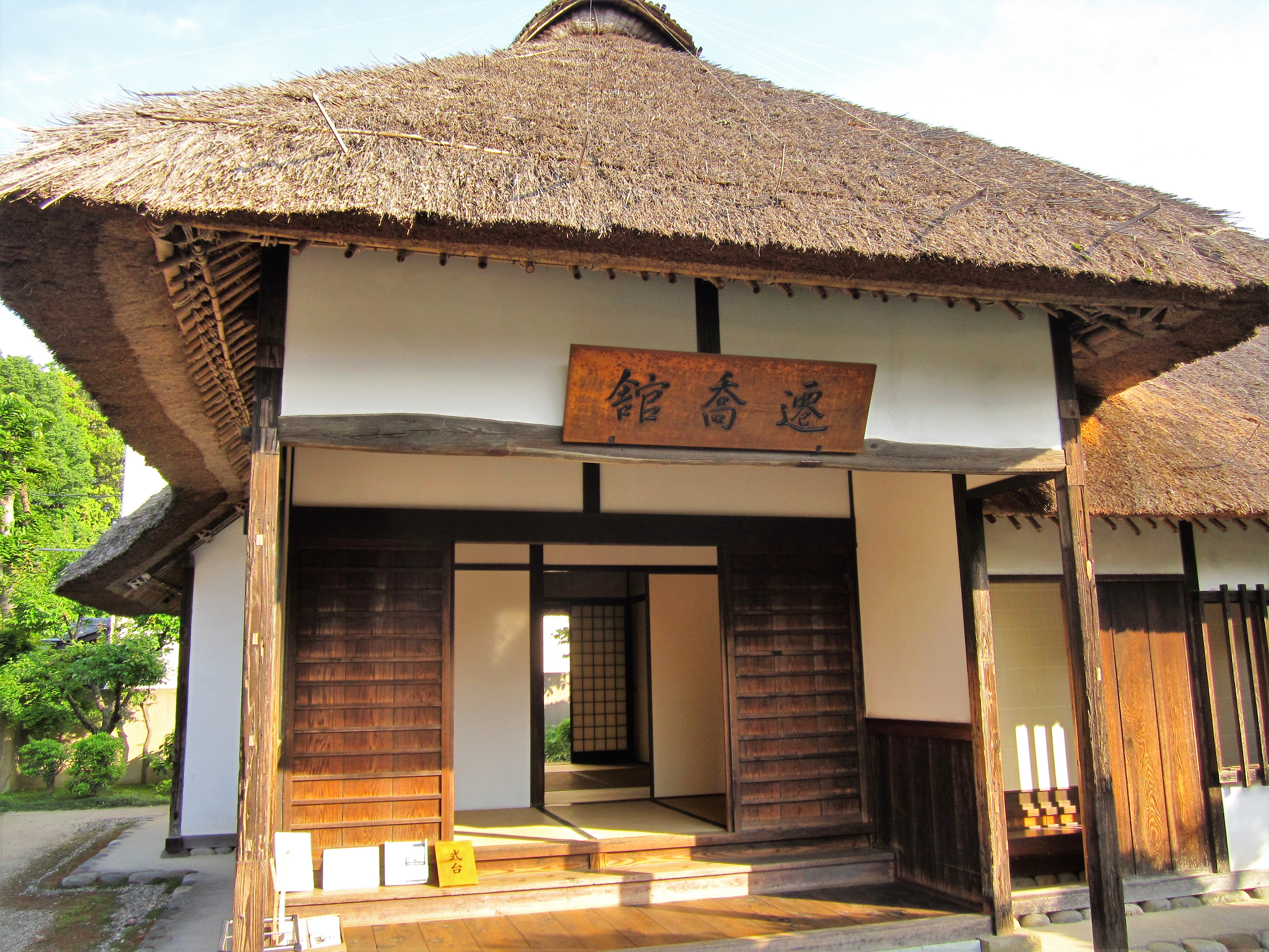 岩槻藩遷喬館（さいたま市岩槻区本町） Canon PowerShot A2200